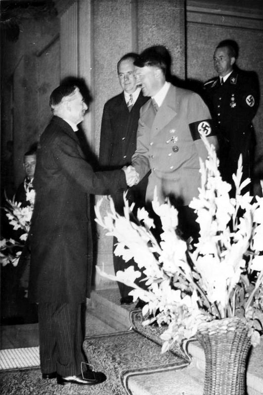 Die Schlußbesprechnung zwischen dem Führer und Ministerpräsident Chamberlain. Der Führer begrüßt den zur Besprechung vor dem Hotel Dreesen in Godesberg eintreffenden britischen Ministerpräsidenten Chamberlain. 24.9.38